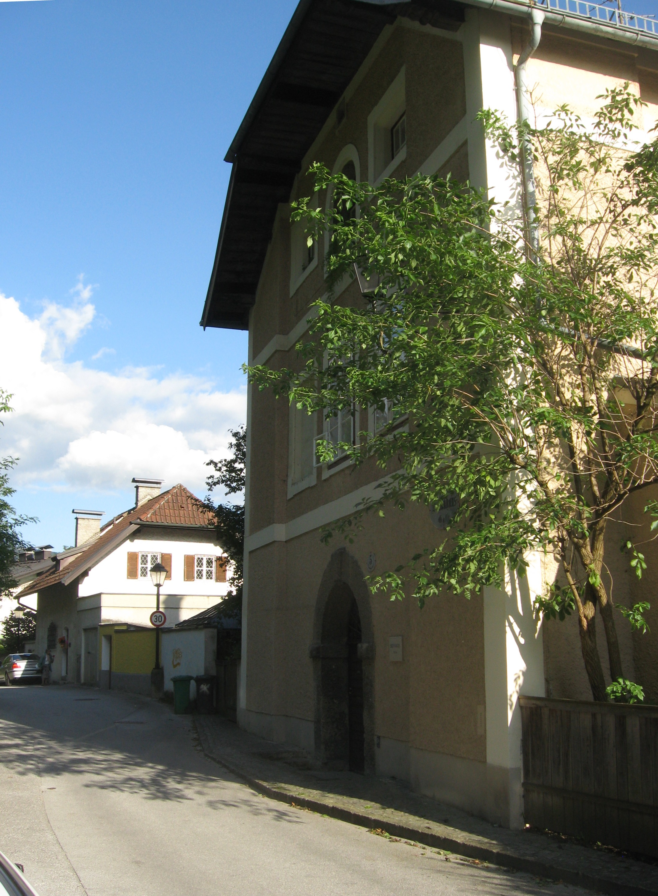 Das Brunnhaus des Almkanals in Salzburg